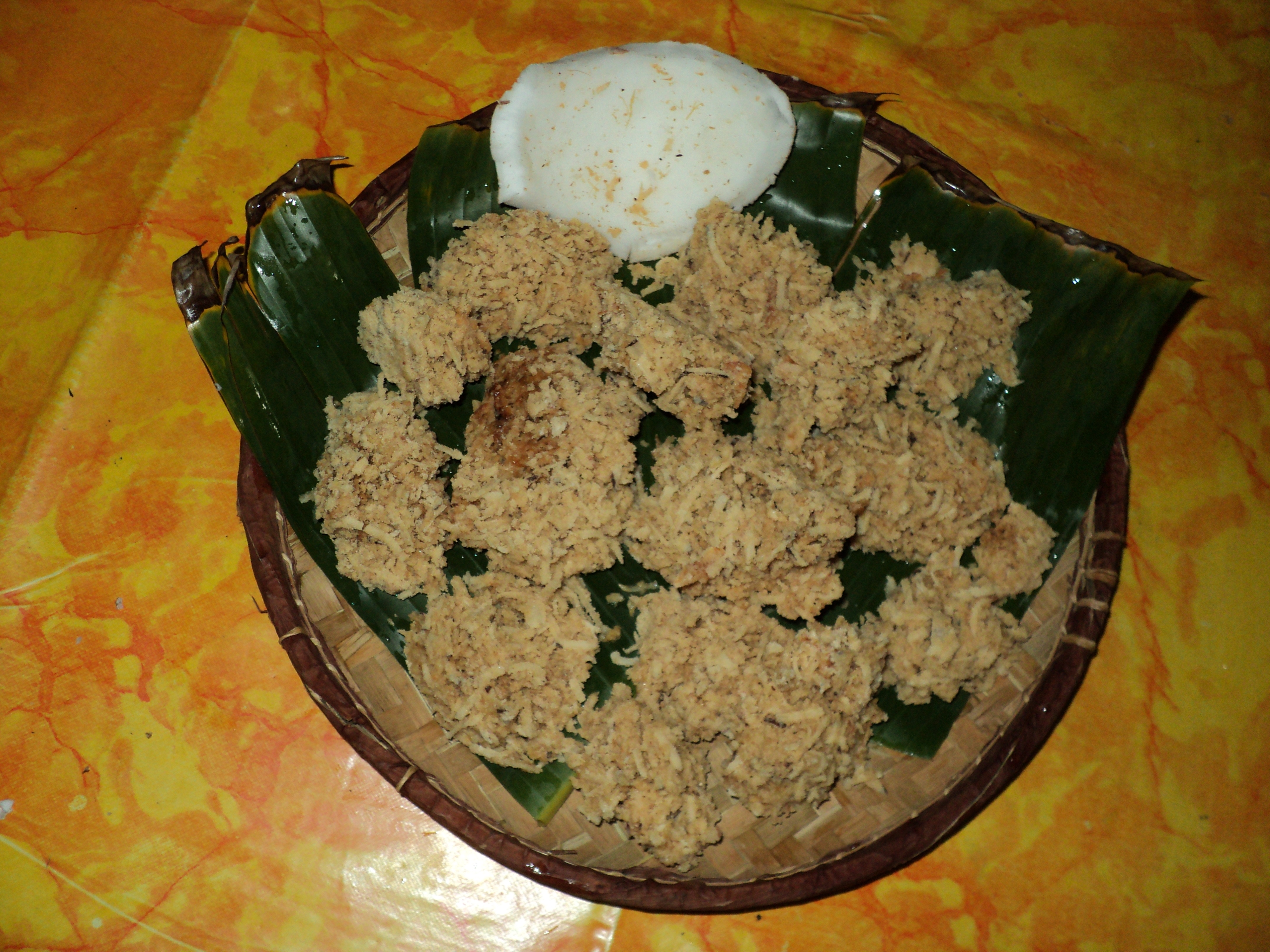 présentation